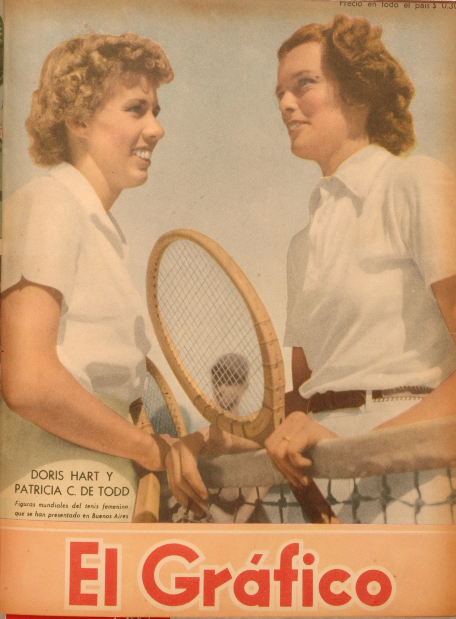 El Grafico del 28 de Noviembre de 1947. Edicion 1481